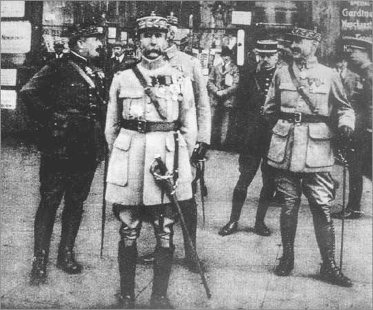 Henri Le Rond (1864-1949), französischer Divisionsgeneral